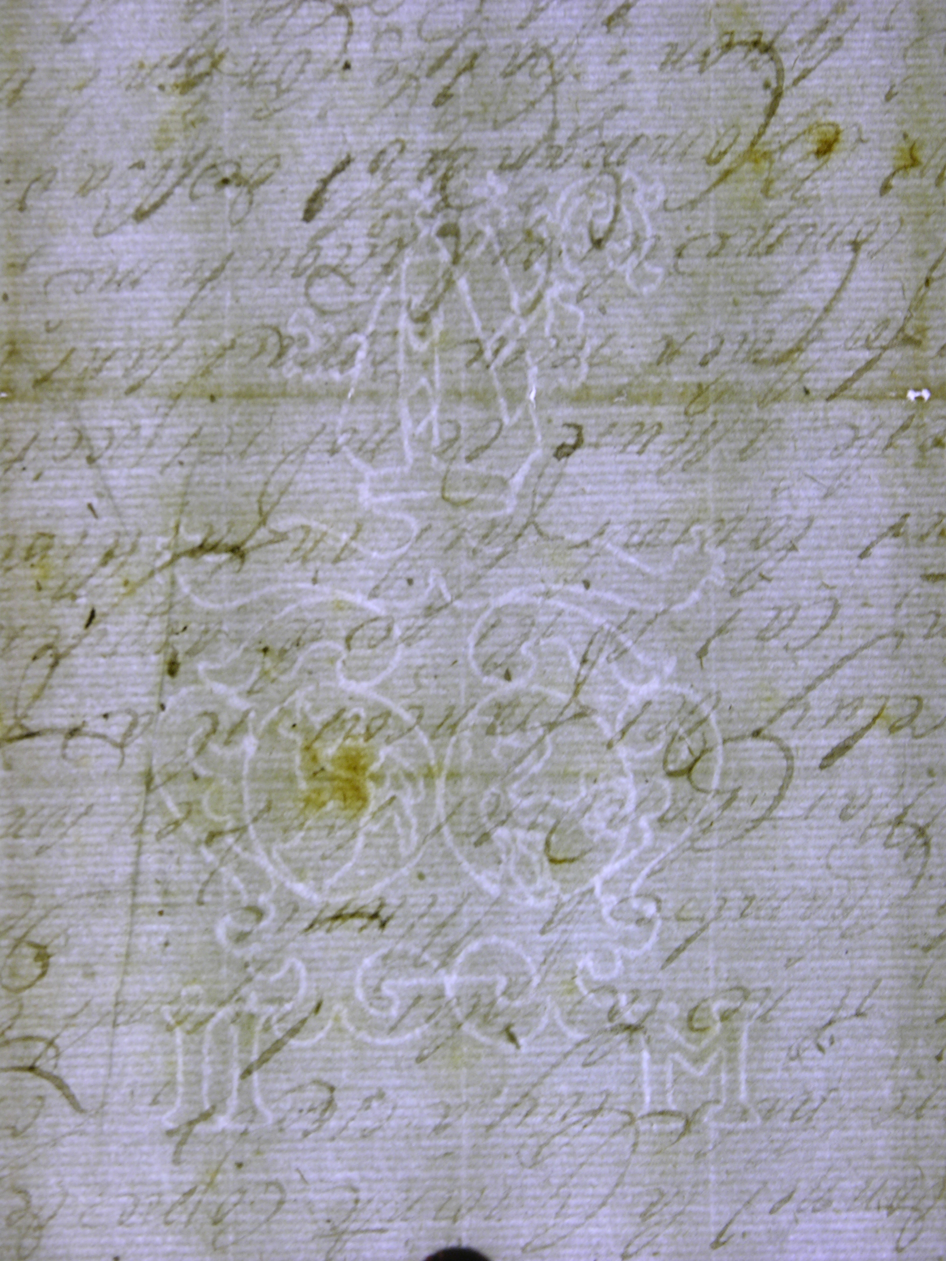 Wasserzeichen auf einem Brief vom 11. Juli 1703 von André Falquet an Johann Scheidlin. Zwei Kreise, links mit Oberkörper einer Hirschkuh, rechts mit Hahn. Um die Kreise herum eine blättriges Ornament. Darüber eine Mitra mit Krümme darin, darunter links «İİ» (wohl zwei grosse «i» mit jeweils einem Pünktchen drauf), rechts «M».